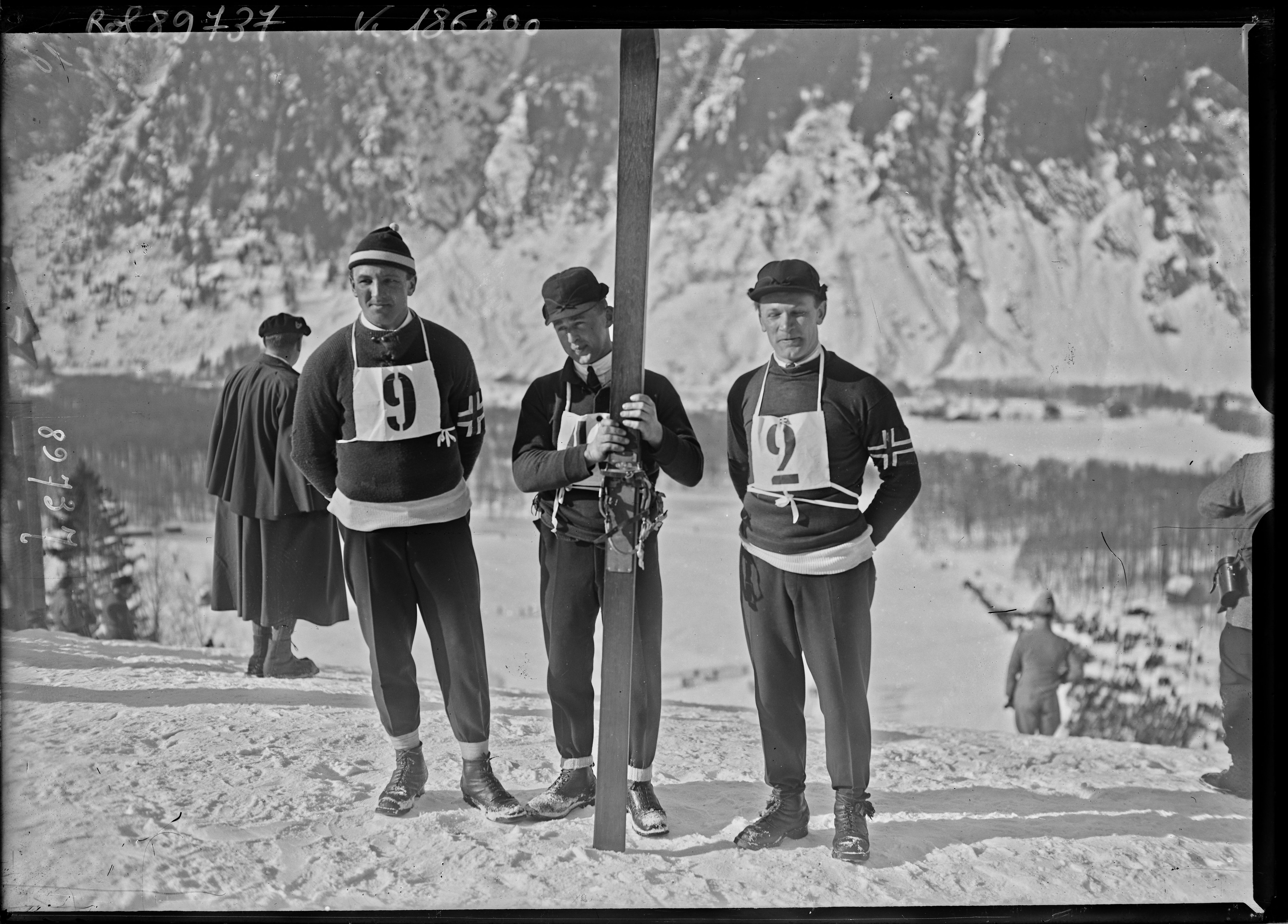 Chamonix, 4/2/24, [saut à ski, de g. à d. les Norvégiens] Thams, Bonna, Lanvik [i.e. Landvik] : [photographie de presse] / [Agence Rol]